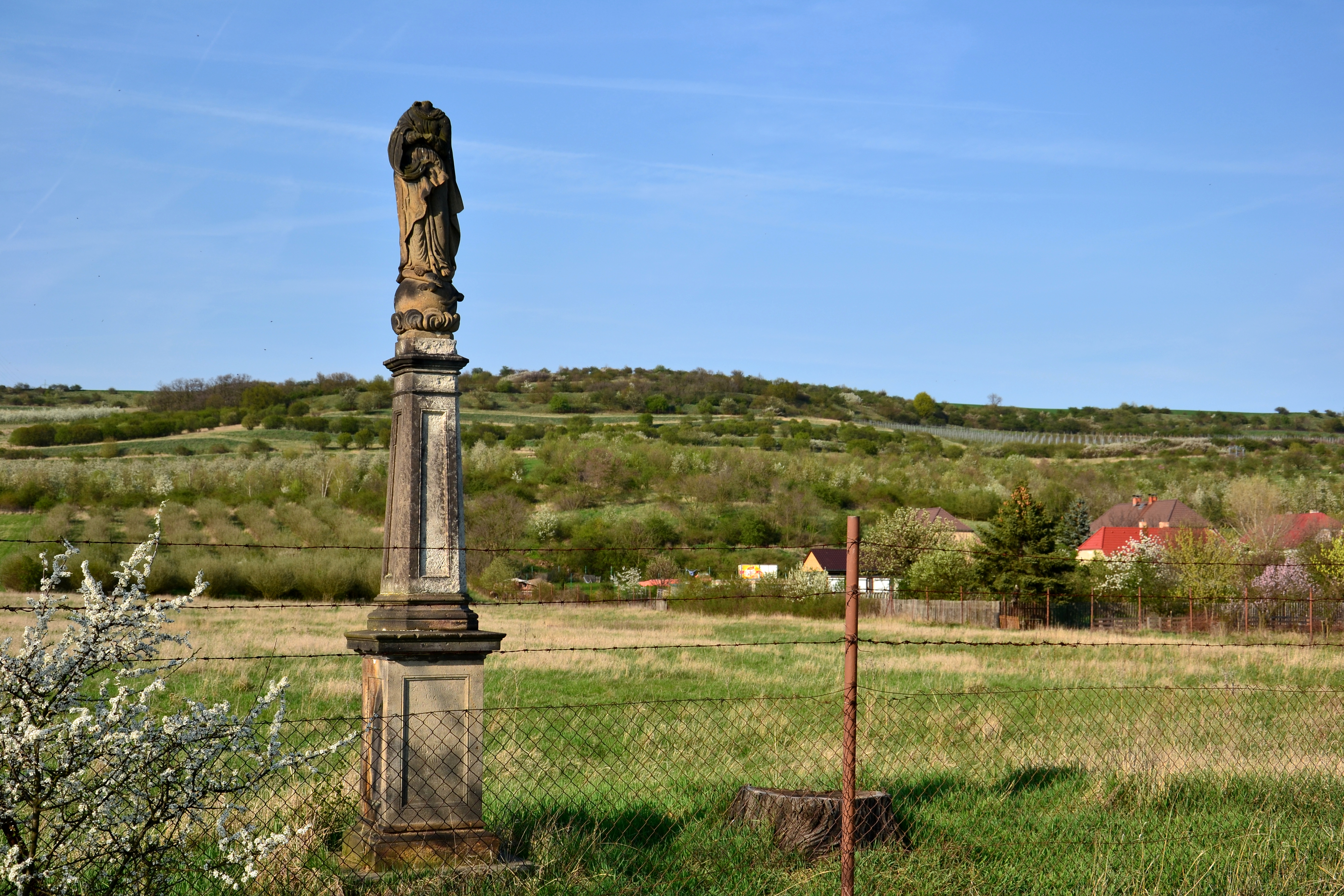 Stranná – sloup se sochou Panny Marie